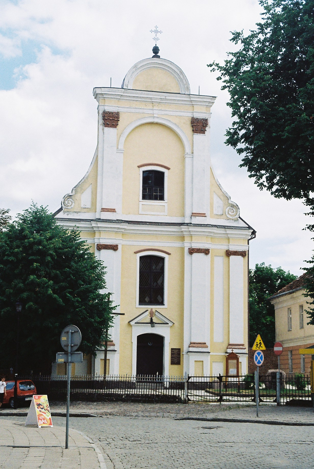 Reszel, ul. Mazurska 1 - dawny kościół p.w. św. Krzyża z wyposażeniem wnętrza, obecnie cerkiew greckokatolicka pw. Przemienienia Pańskiego (zabytek nr A-32 z dn. 2.09.1949)